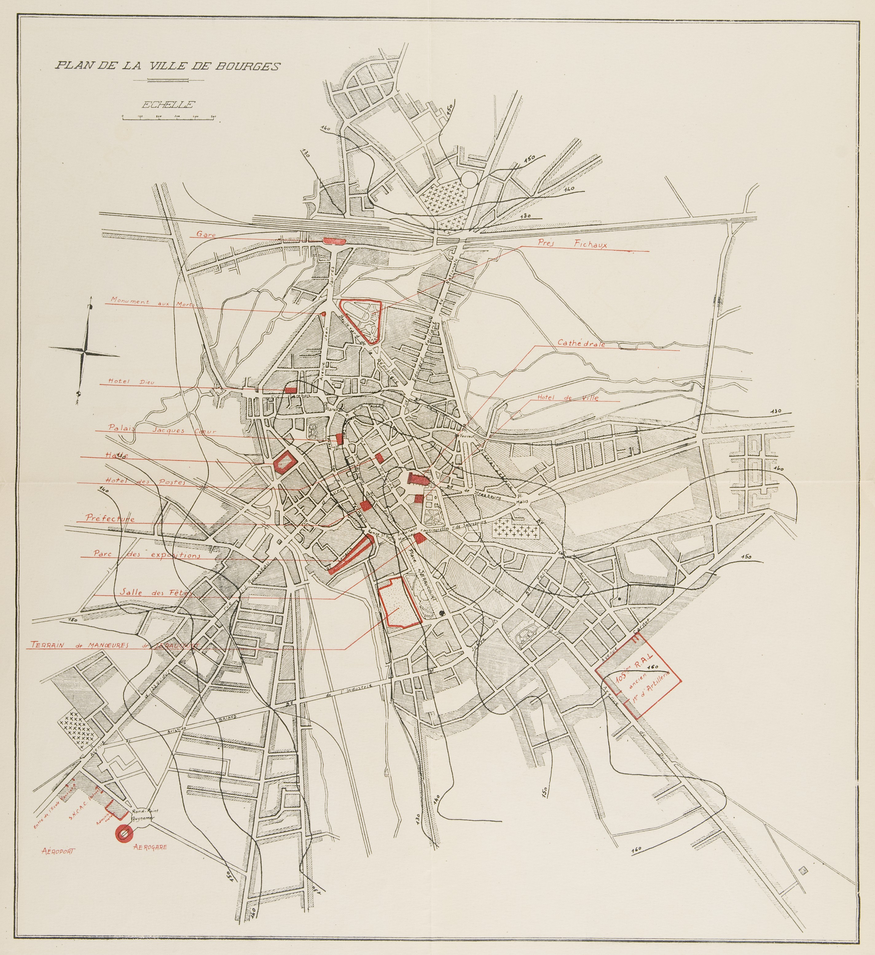 Carte de Bourges en 1930